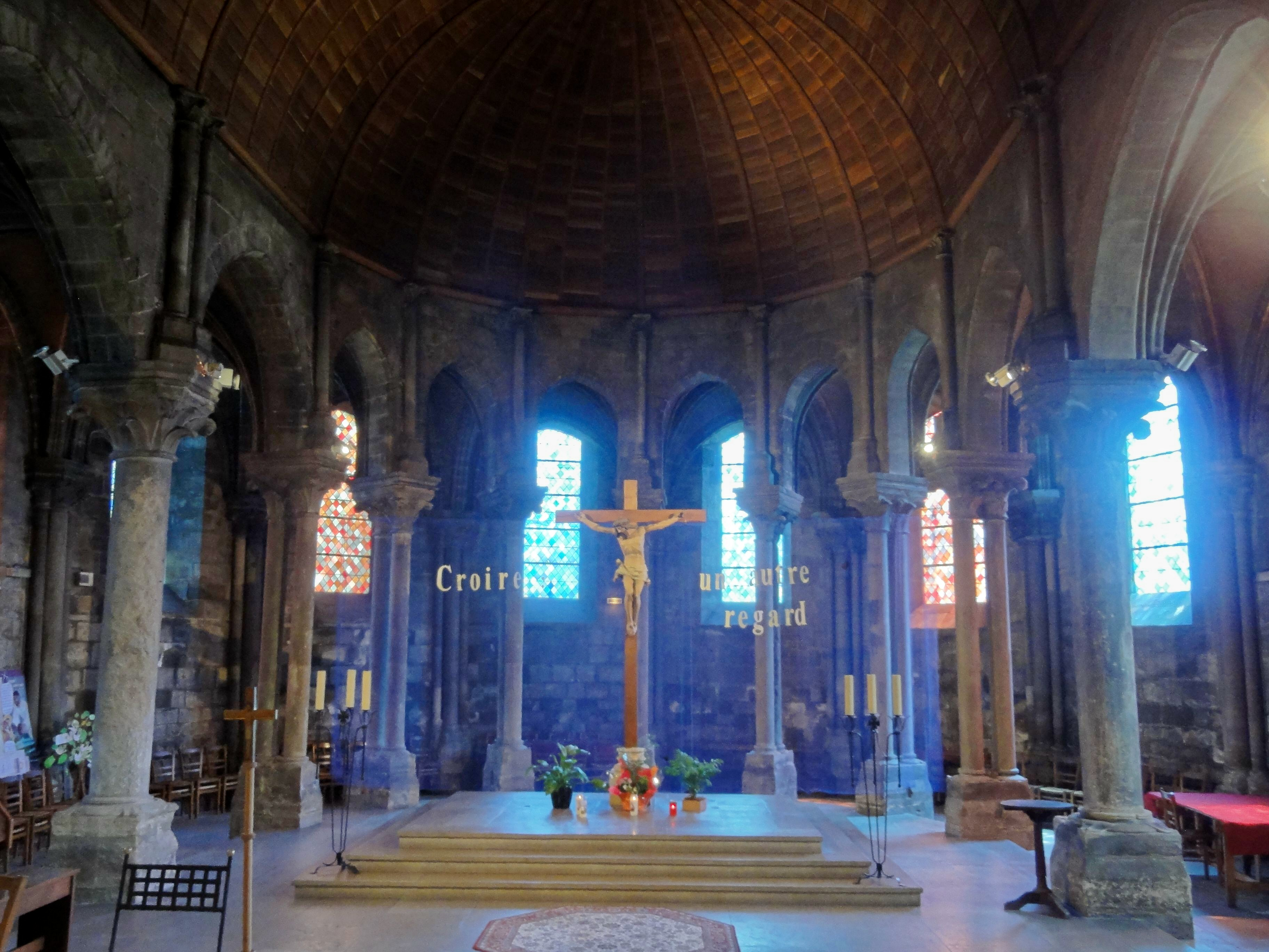 Chœur.